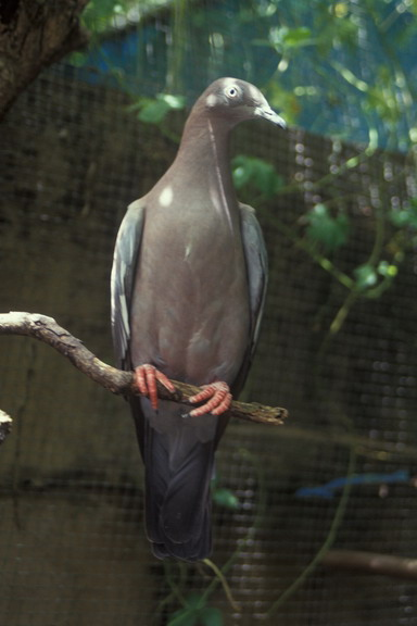 Patagioenas inornata wetmorei, Puerto Rican Plain Pigeon. Location: Puerto Rico Photo: Carlos Ruiz